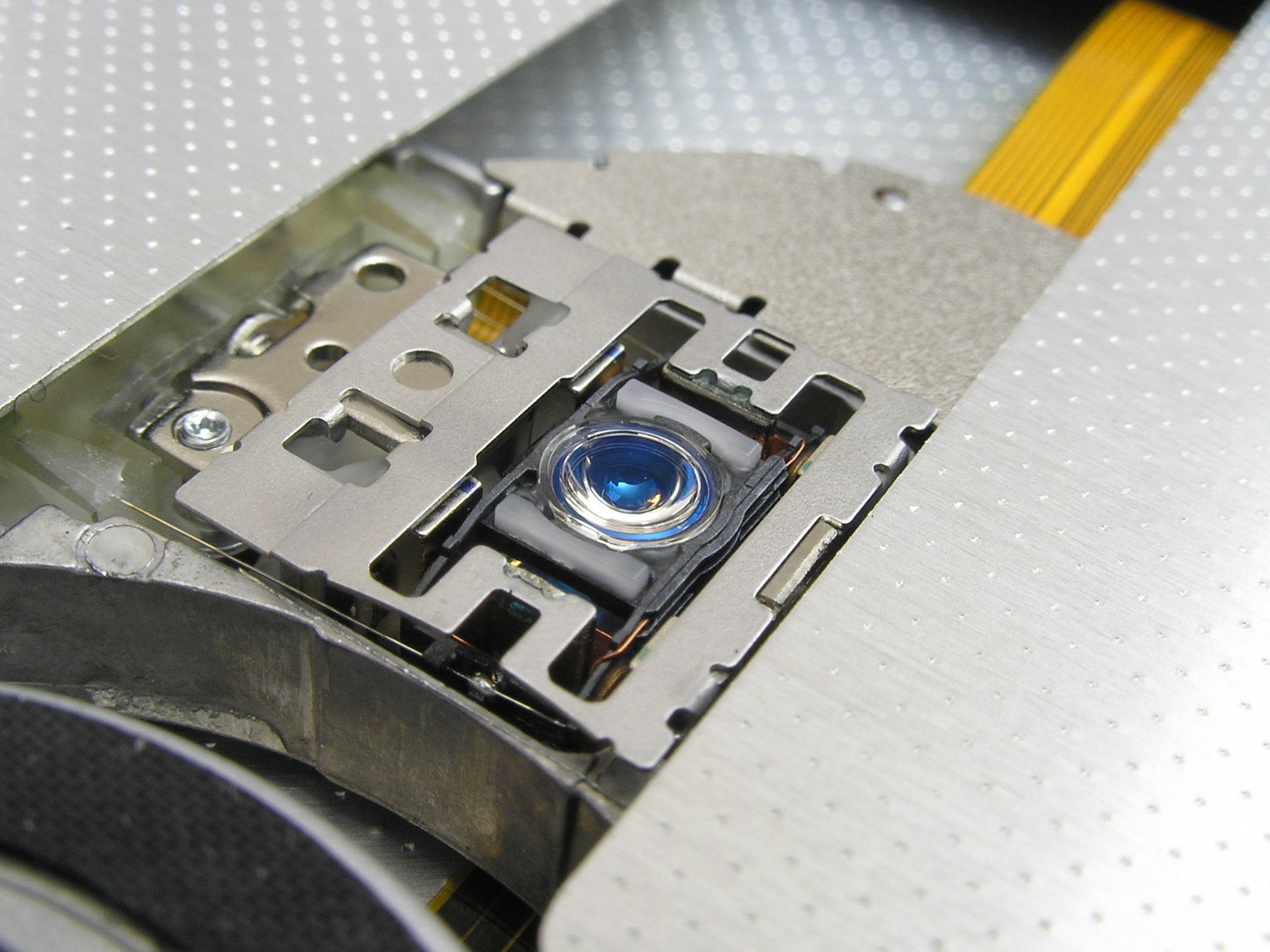 Schreib- und Leseeinheit eines CD- und DVD-Laufwerkes in SlimLine-Bauart; in der Mitte die Linse des Lasers (blau) auf einem Schlitten, welcher sich im Bezug auf den Datenträger von innen (auf dem Bild links unten) nach außen (rechts oben) bewegen kann, mit dem Gehäuse des Laufwerkes über einem Flachband-Kabel für die Datenübertragung (gelb) verbunden